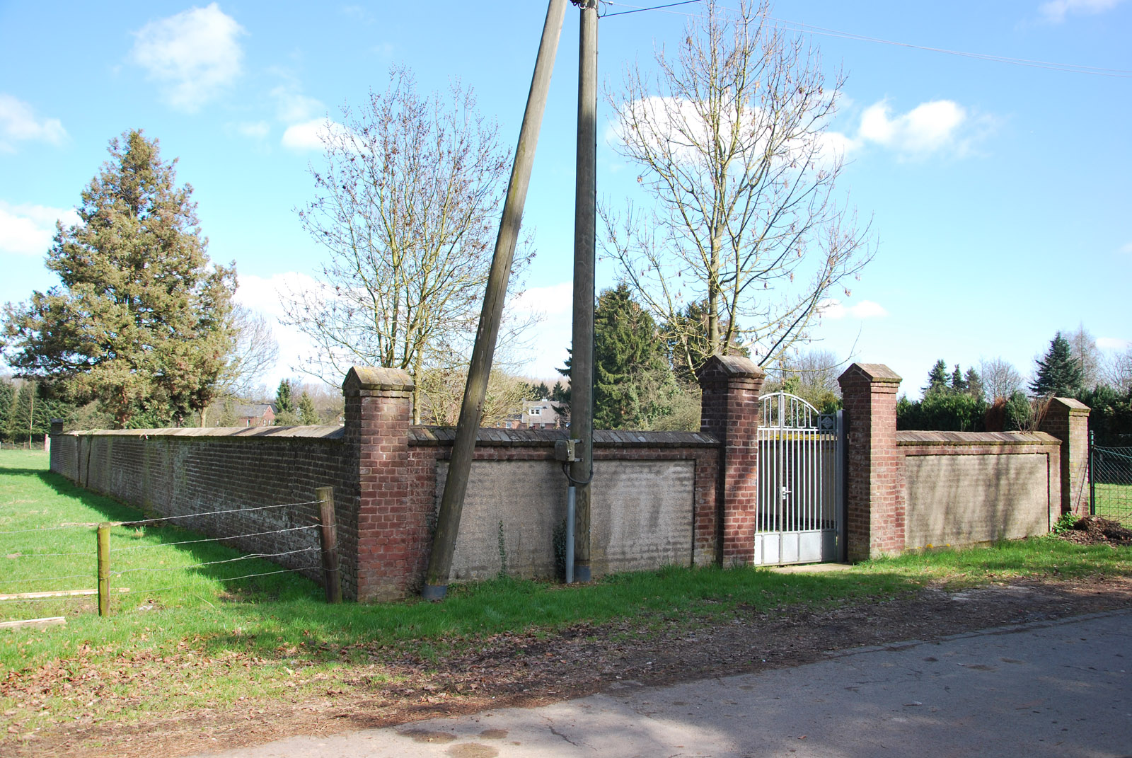 Jüdischer Friedhof Donatusstraße in Pesch (Korschenbroich) von außen